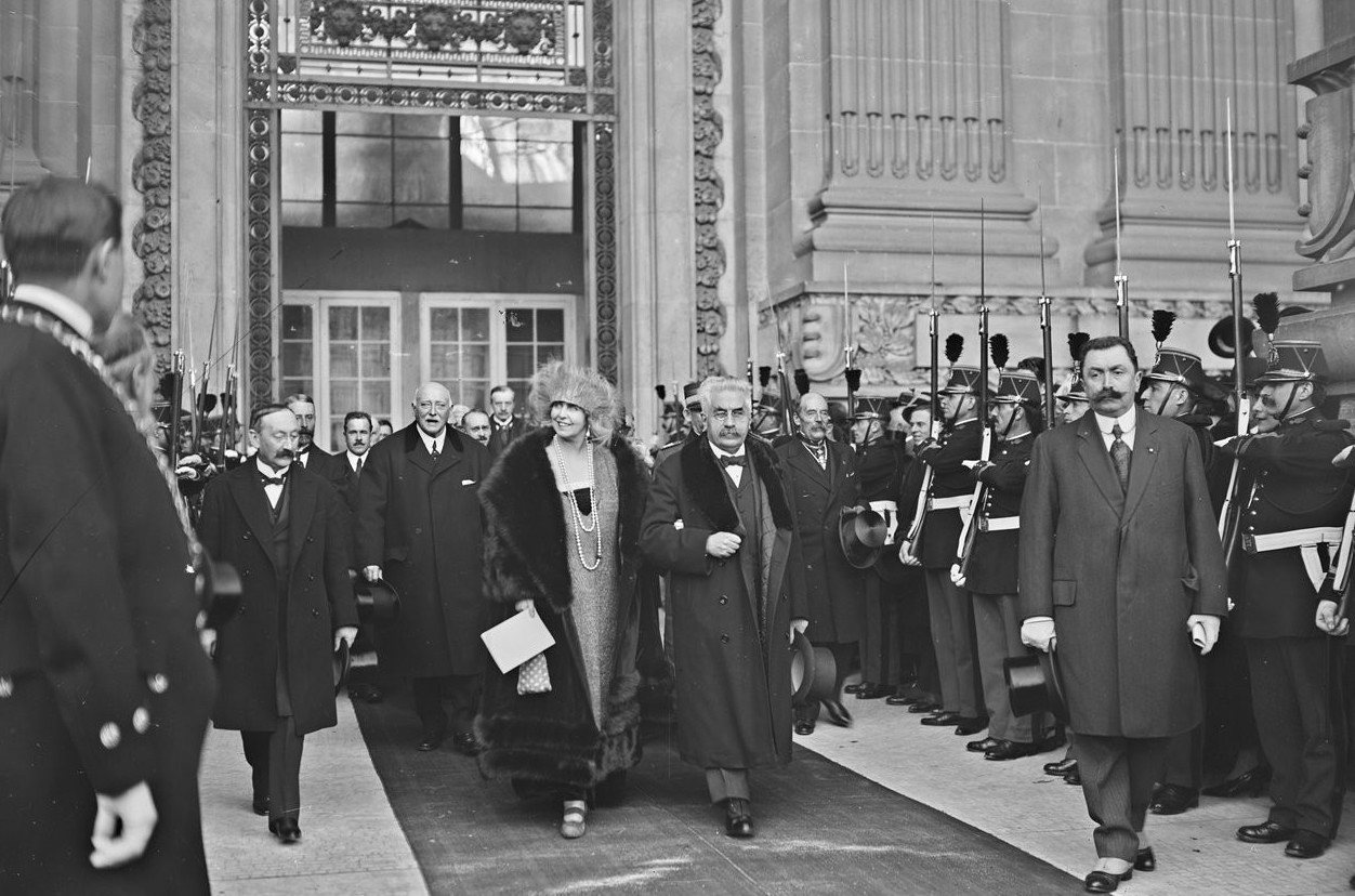 Alexandre Millerand, président de la République française, avec la reine Marie de Roumanie.